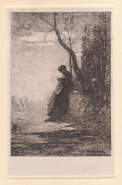 Il soggetto, una pastorella appoggiata ad un rustico pozzo che fa la calza poco distante dal suo gregge, ripropone in controparte il disegno conservato presso l'università delle Arti di Tokyo. L'esemplare è ad oggi l'unico noto in uno stato precedente a quello che la bibliografia definisce “stato unico” (esemplare conservato in Collezione Davoli a Reggio Emilia con la dicitura “prova di saggio che deve servire di norma al calcografo”, stampato su carta cina). Si differenzia per la mancanza dei tratti che simulano il fogliame sui due rami a sinistra del tronco dell'albero, per la mancanza di molti tratti che scuriscono il terreno e per la mancanza dei tratti che definiscono la pecora più a destra del gruppo di tre sulla sinistra della composizione e dei tratti che aggiungono un agnello alla destra del gruppo. In generale sembra che la lastra sia stata sottoposta ad una più leggera morsura rispetto allo stato noto ai cataloghi, differenza questa, che peraltro contraddistingue il modus operandi di Fontanesi in altre lastre (es. Mucche, Pastorale). L'incisione, già apprezzata dalla critica per il suoi effetti tonali è in questa prova ancora più delicata e leggibile nell'insieme. Firma nell'inciso in basso a destra. Impressione eccellente stampata su carta cina applicata ad altra avorio spessa con leggera velatura riquadrata, ampi margini. Ottimo stato di conservazione eccetto parziale ingiallimento al solo verso lungo i margini del foglio e due macchioline sul foglio cina all'esterno dell'immagine. Bibliografia: Dragone, n 90; Scheda tecnica di Matteo Crespi, Il bulino antiche stampe Milano, 2012.